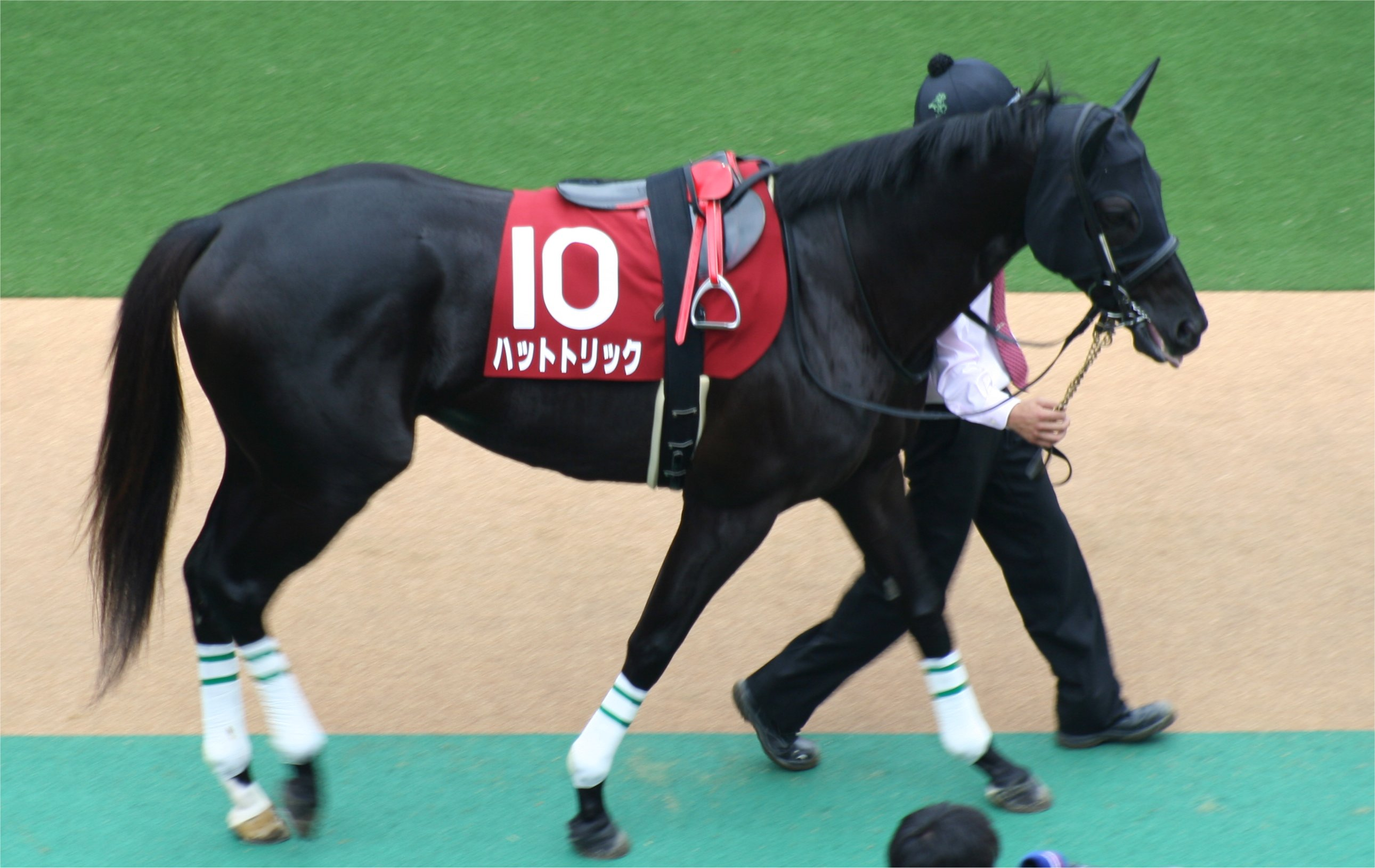 ハットトリック（東京競馬場、パドック）